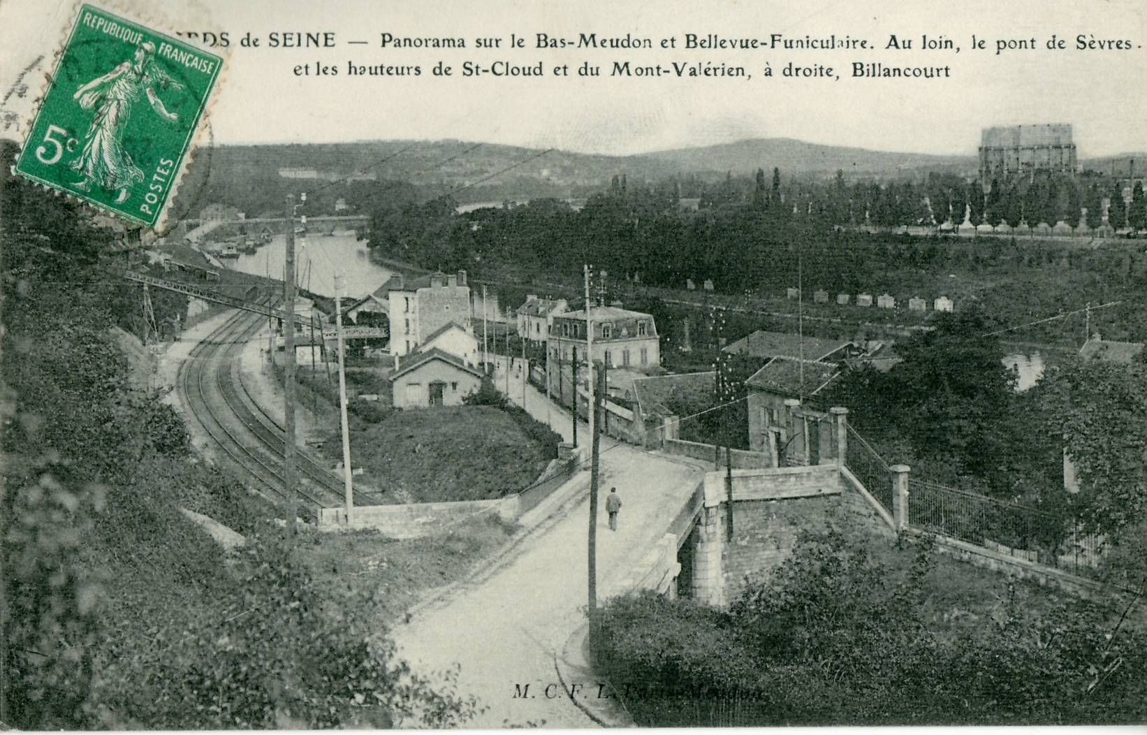 Carte postale ancienne éditée par M. C. F. La Parise MeudonBORDS DE SEINE - Panorama sur le Bas-Meudon et Bellevue-Funiculaire. Au loin, le Pont de Sèvres et les hauteurs de St-Cloud et du Mont-Valérien, à droite, Billancourt